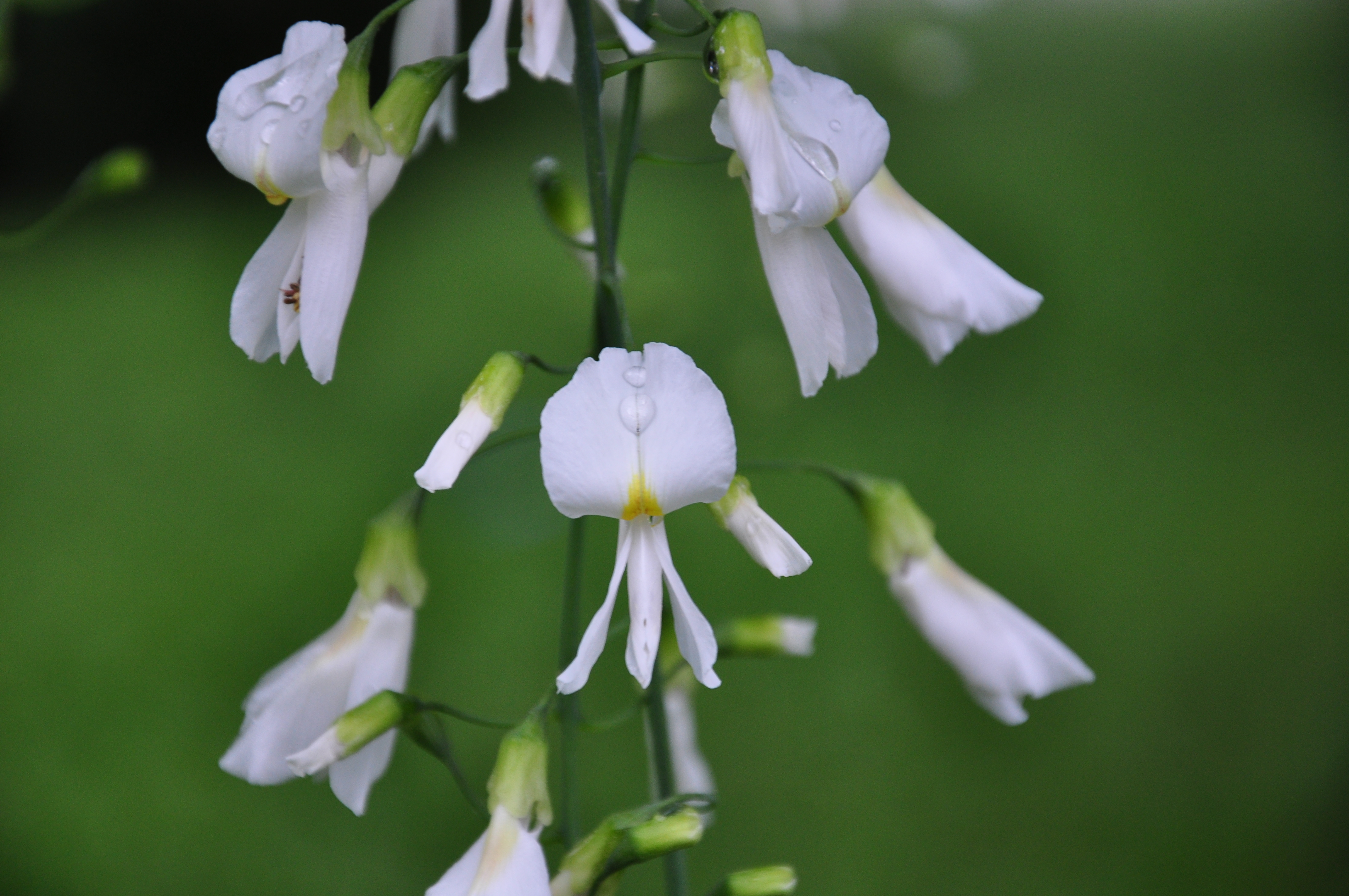 Cladrastis kentukea